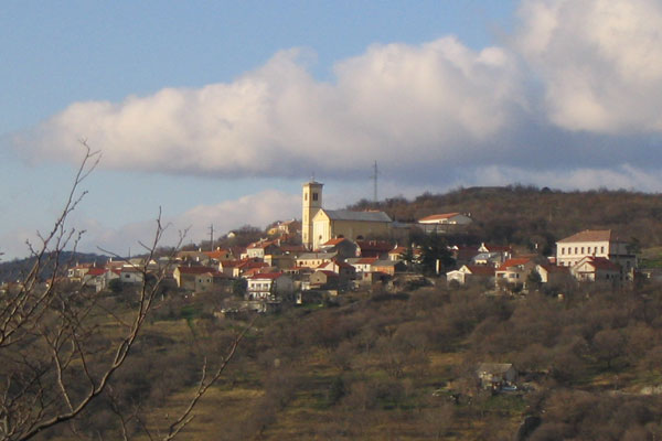 Praputnjak, near Bakar, Croatia